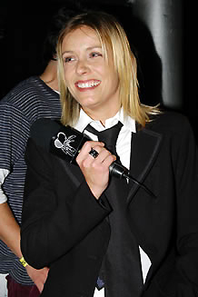 Claudia Conserva, actriz y presentadora de televisión chilena. Fotografía tomada el día 1 de agosto de 2007, cuando participó como notera invitada del programa Caiga Quien Caiga (Chile) en la fiesta de lanzamiento de la teleserie peruana Un Amor Indomable, transmitida por Red Televisión.